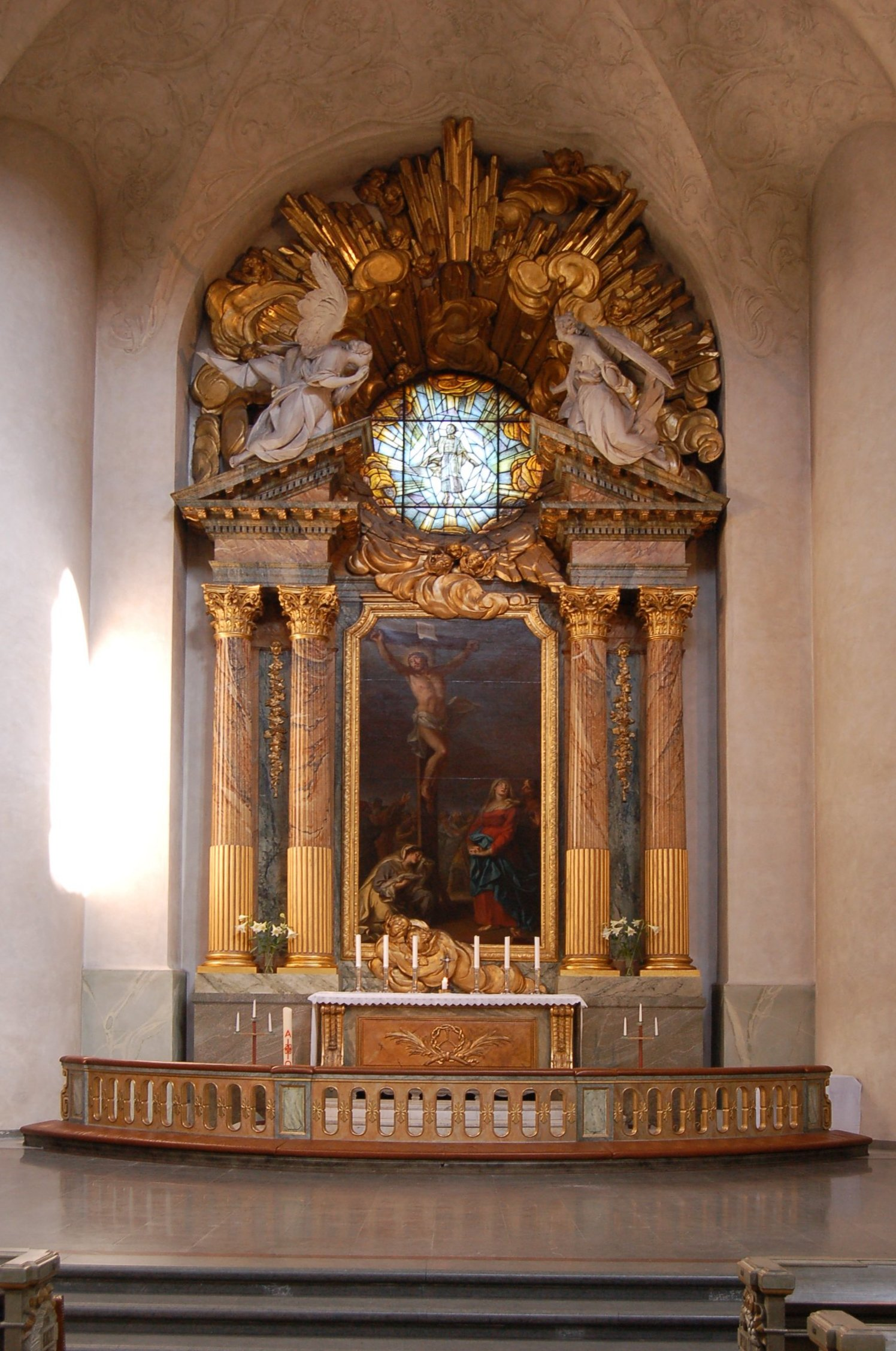 Altaret i Hedvig Eleonora kyrka i Stockholm